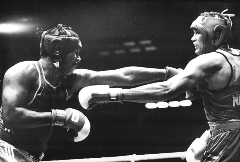 Berlin, TSC-Boxturnier, Roberto Balado, Arnold Venderlidje ADN-Bernd Settnik 7.10.90 Berlin: 21. Internationales TSC-Turnier im Boxen-Im Superschwergewicht standen sich der Holländer Arnold Venderlidje und der Kubaner Roberto Balado (l) gegenüber. Mit 27:30 Punkten gewann der Recke aus der Inselrepublik den Kampf.